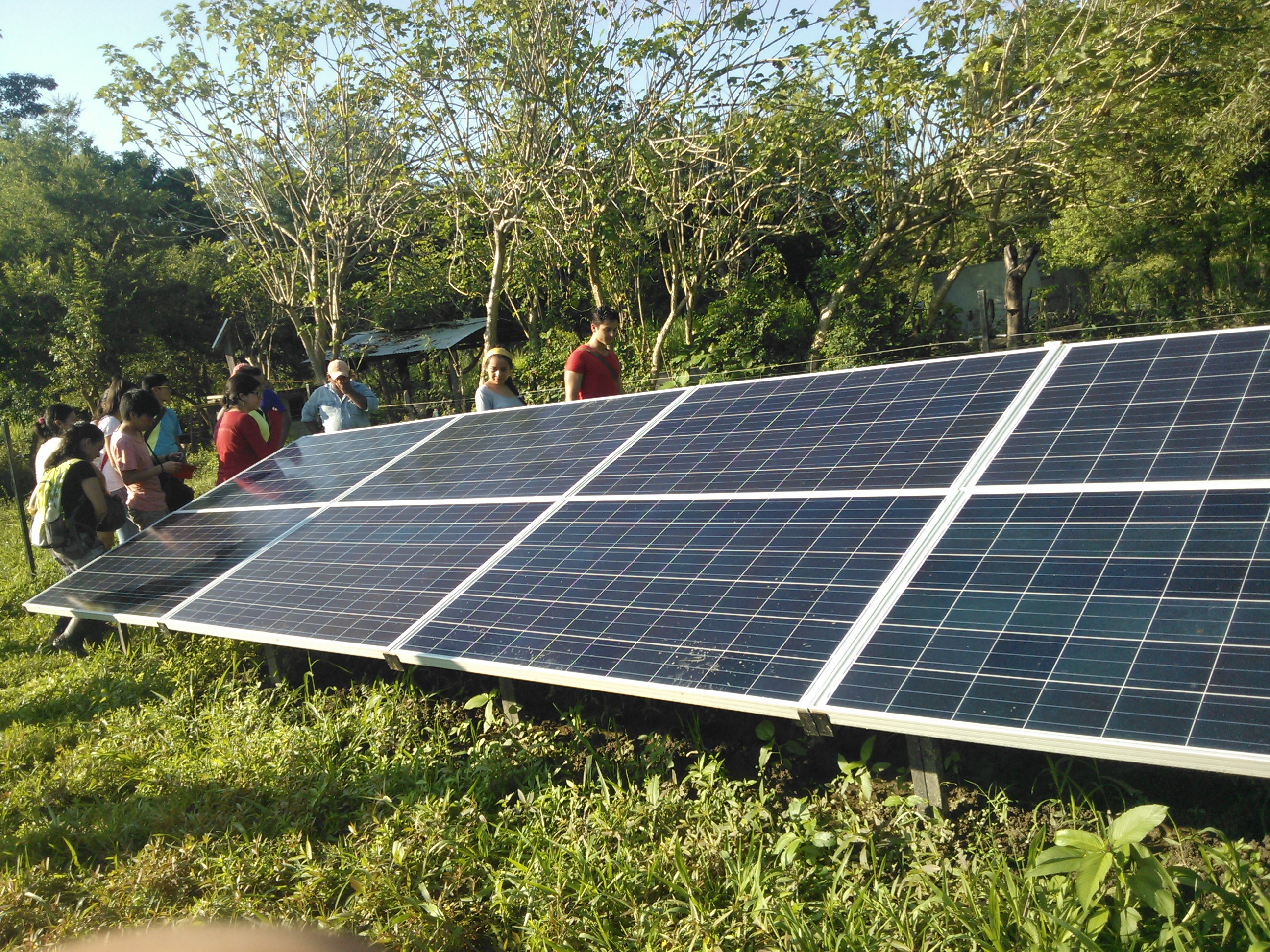 Fotografía que muestra un sistema de riego en un sistema silvopastoril cuyo método de bombeo es mediante una bomba tradicional, siendo esta alimentada por un arreglo de páneles solares fotovoltáicos, en Pijijiapan, Chiapas.